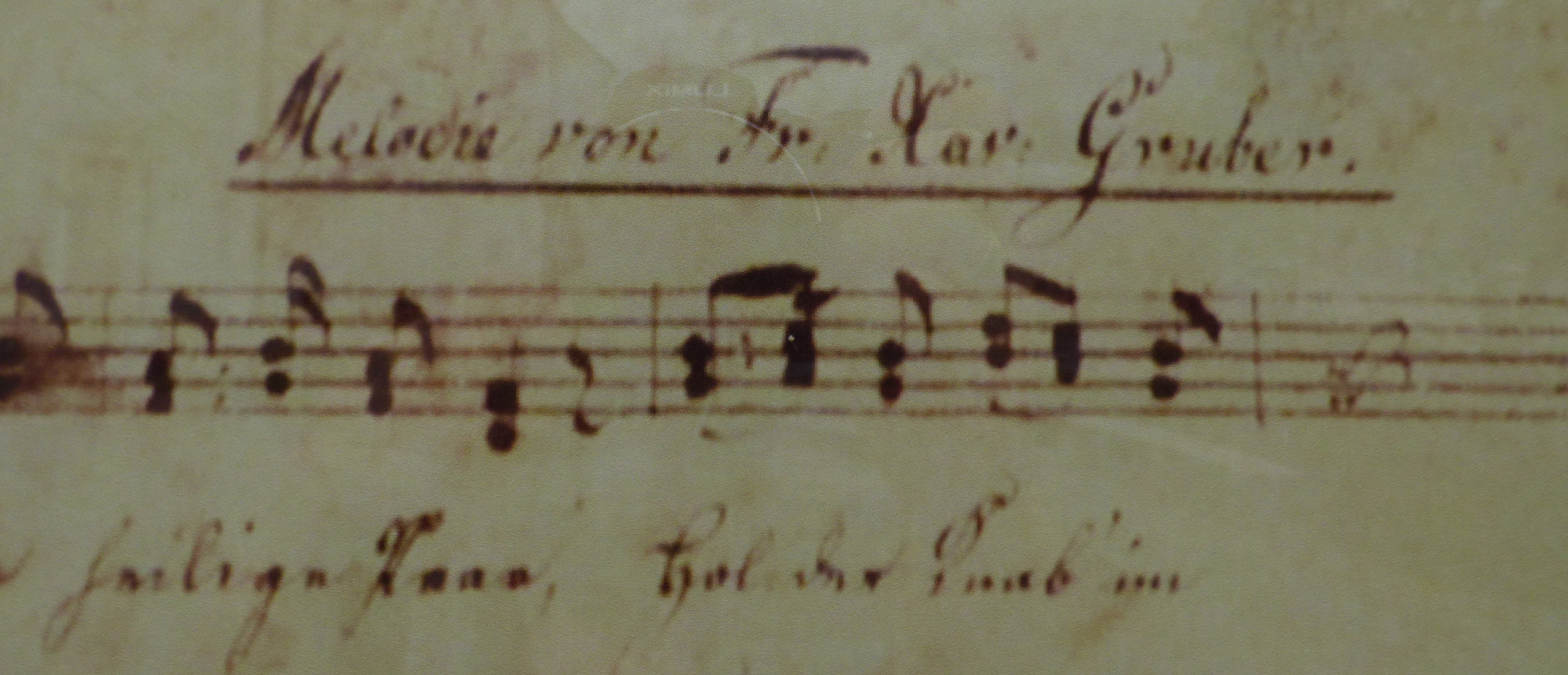 Stille-Nacht-Brunnen in Mariapfarr: Abbildung der ältesten erhaltenen Abschrift des Liedes von Joseph Mohr, Kopfzeile